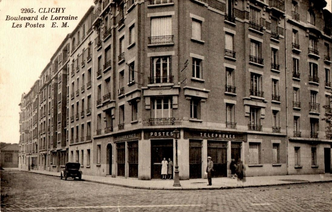 Clichy-la-Garenne.Boulevard de Lorraine.Les postes